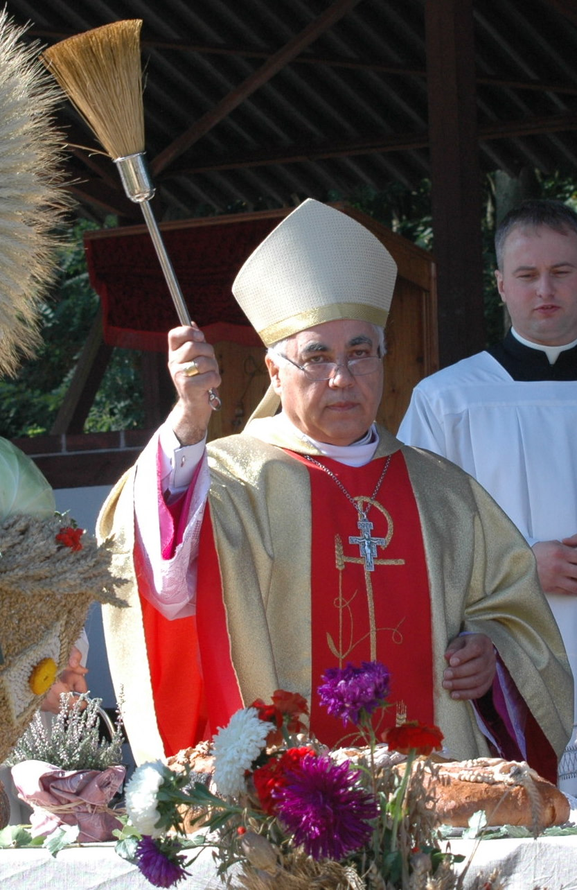 Marian Błażej Kruszyłowicz - Biskup pomocniczy szczecińsko-kamieński podczas dożynek w Wolinie